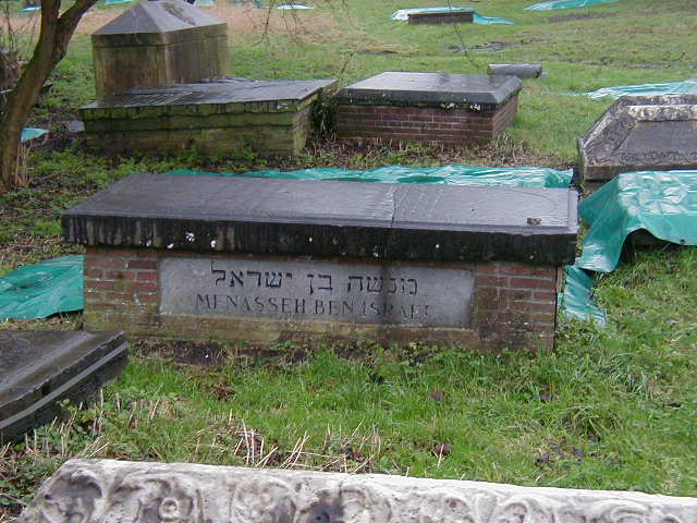 ציונו של מנשה בו ישראל